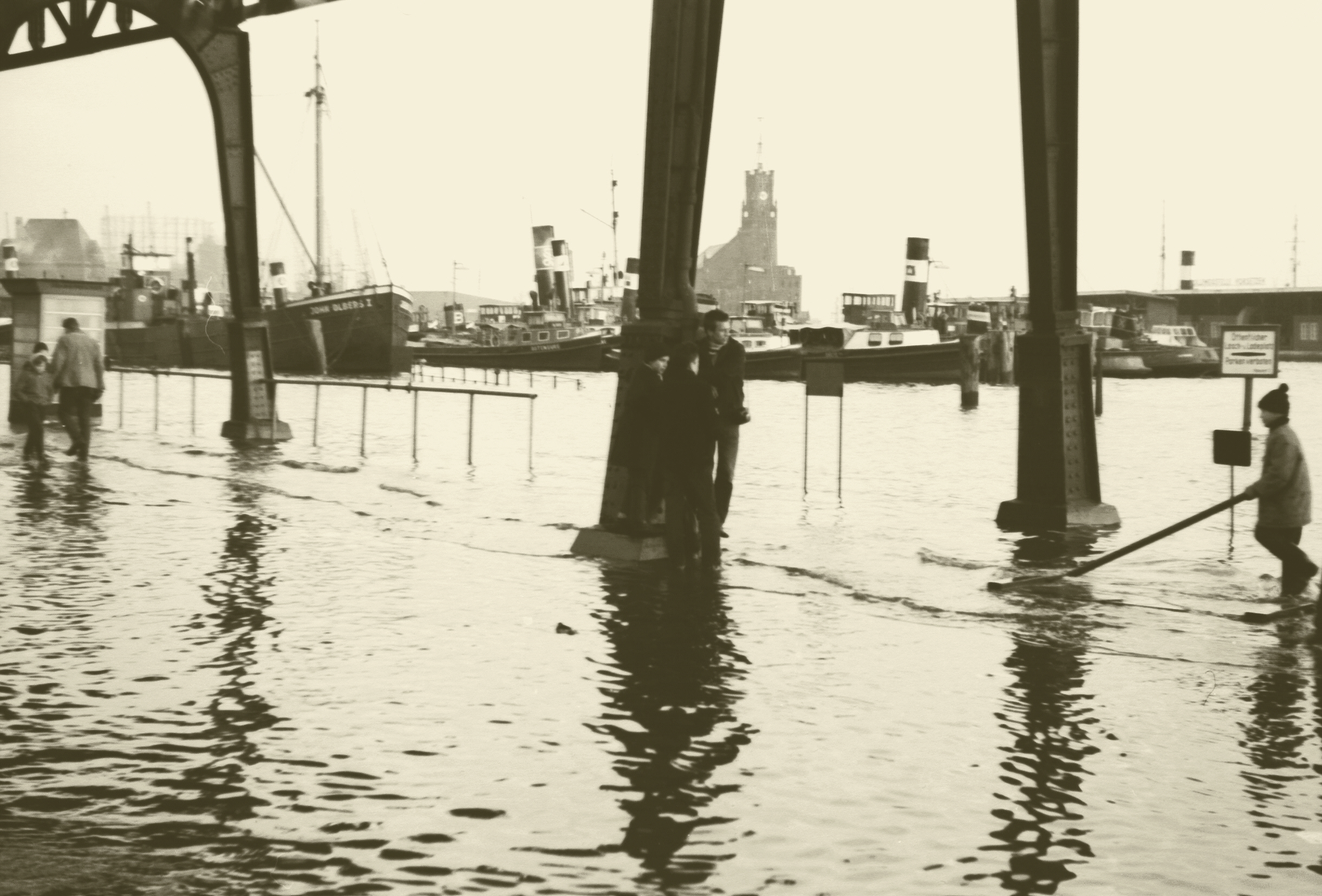 Überschwemmung in Hamburg an den Vorsetzen am 17.02.1962. Im Vordergrund sind zu sehen die Stützpfeiler des Hochbahn-Viaduktes. Im Hintergrund sieht man das Gebäude Kehrwiederspitze. Die Elbe hat unzählige Deiche durchbrochen.